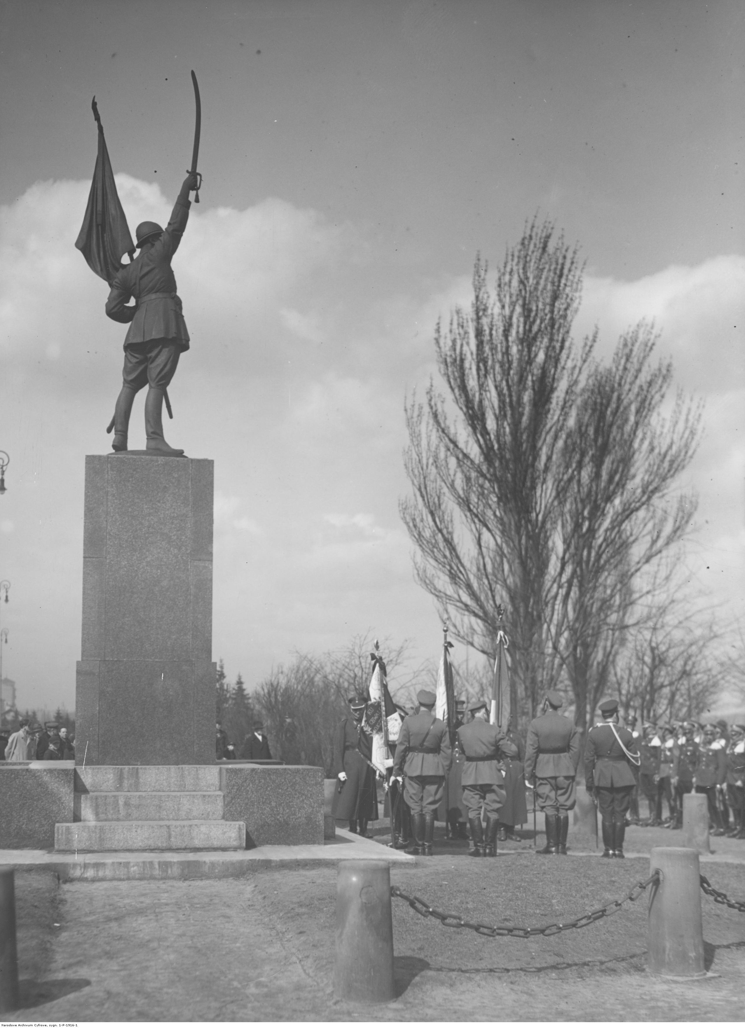 Uroczystość poświęcenia sztandaru okręgu stołecznego Związku Żołnierzy I Polskiego Korpusu Wschodniego w Warszawie. Składanie wieńca pod pomnikiem Dowborczyków na Wybrzeżu Kościuszkowskim. Koncern Ilustrowany Kurier Codzienny - Archiwum Ilustracji. Sygnatura: 1-P-1916-1